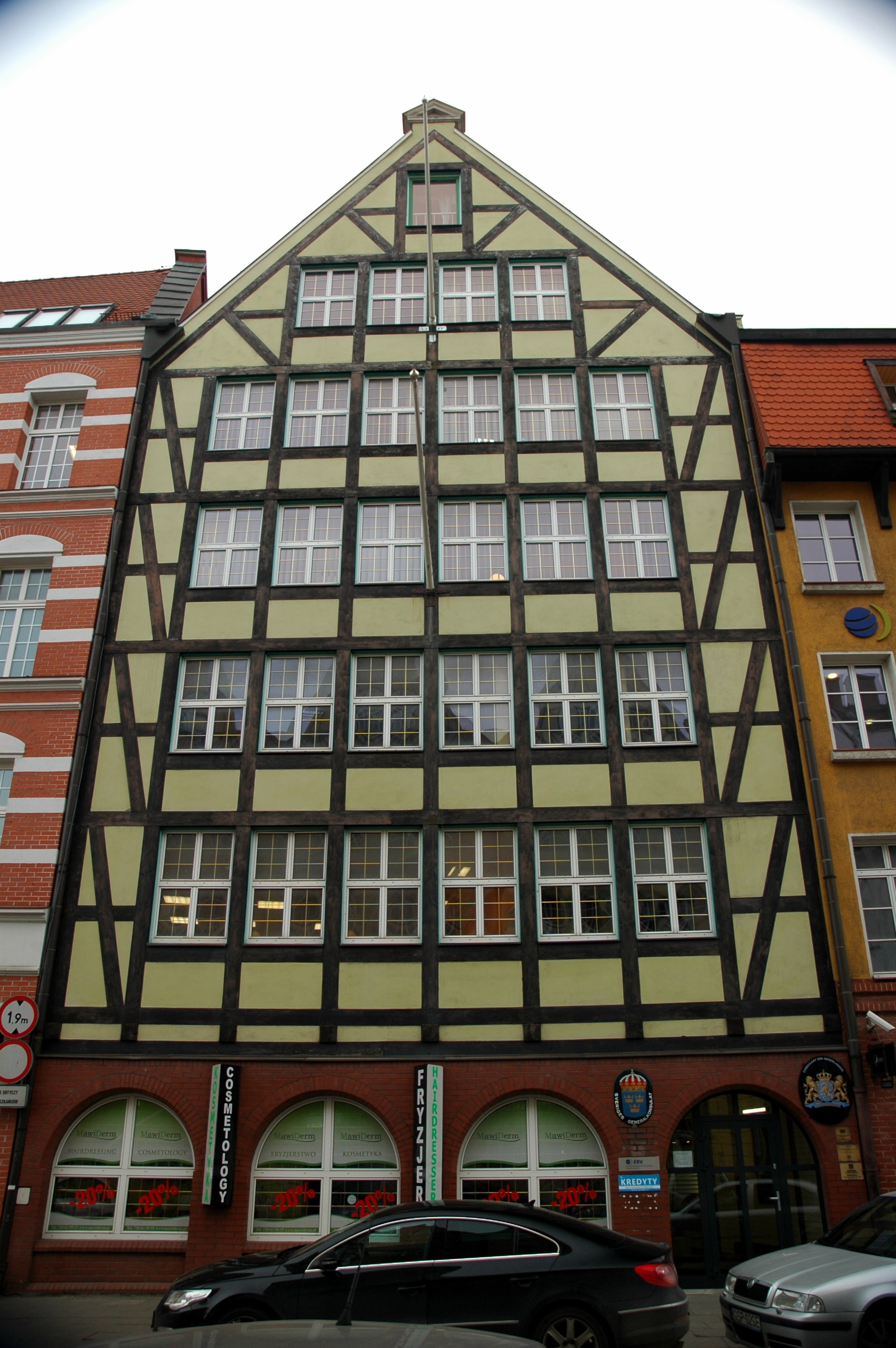 Gdańsk - Chmielna 101, Konsulat Królestwa Niderlandów